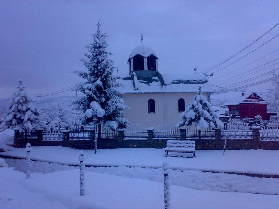 Црква Св. Недеље у Горњој Гуштерици